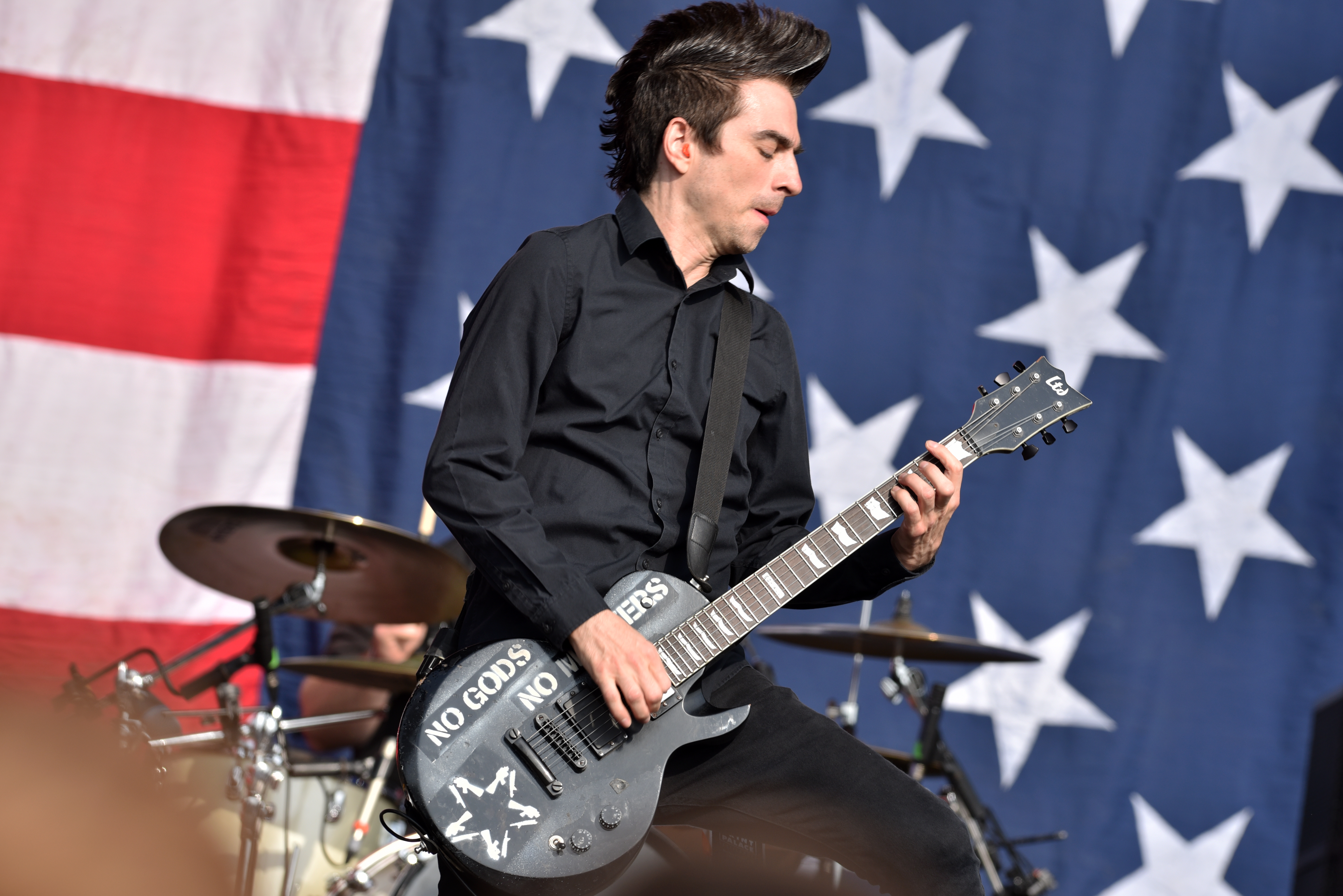 Anti-Flag beim Reload Festival 2017